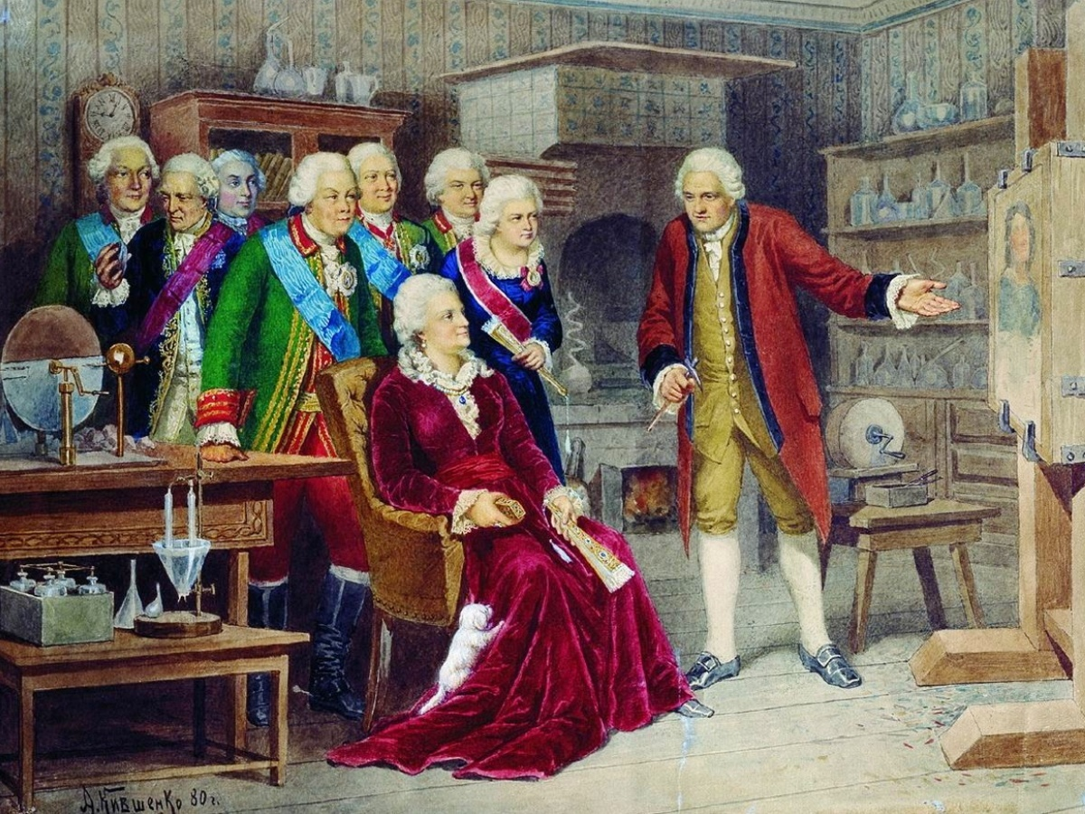 Это репродукция картины Алексея Кившенко: «М.В. Ломоносов показывает Екатерине II в своем рабочем кабинете собственные мозаичные работы.»